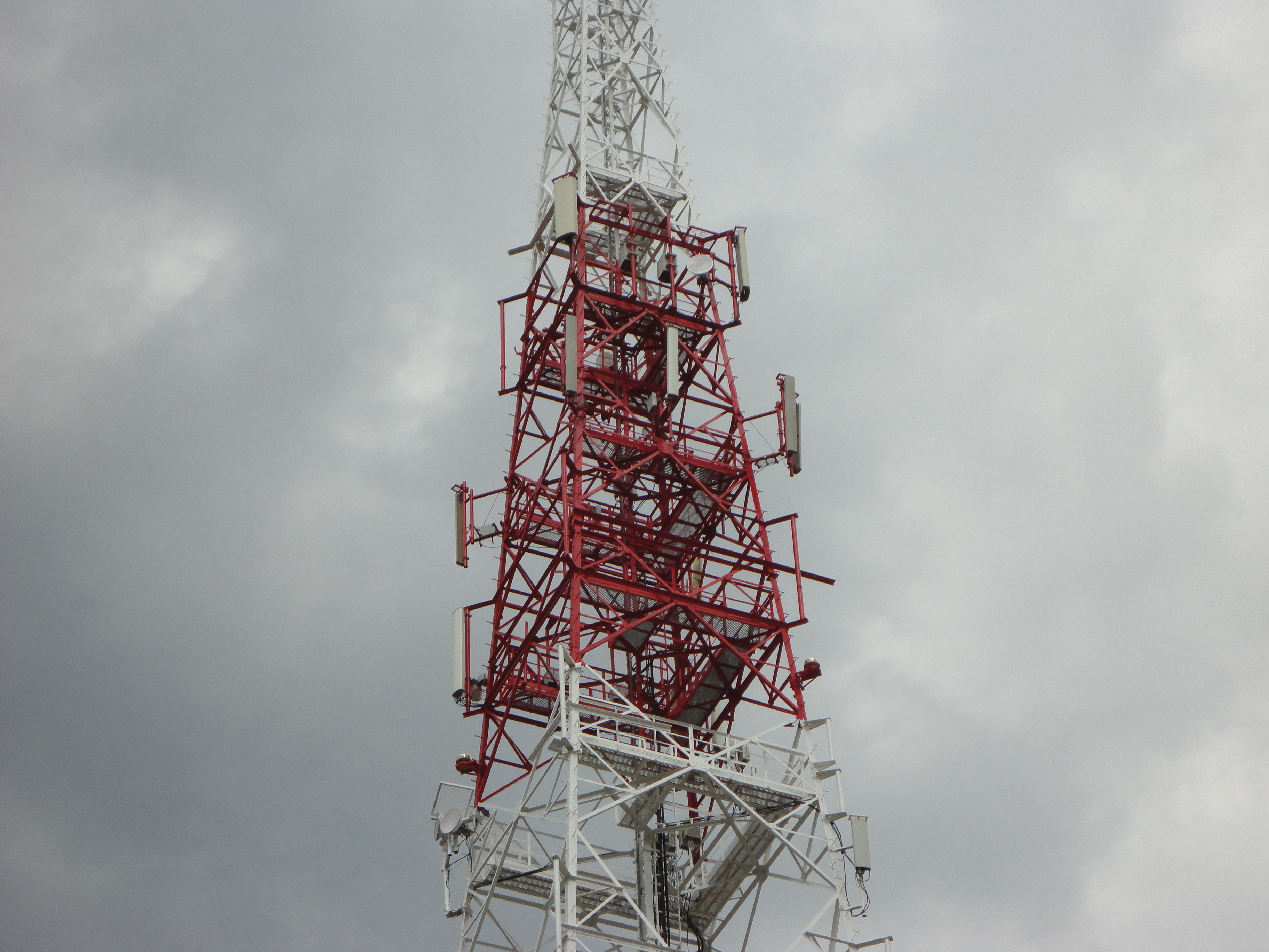 Stacja bazowa we wsi Gózd w Świętokrzyskiem